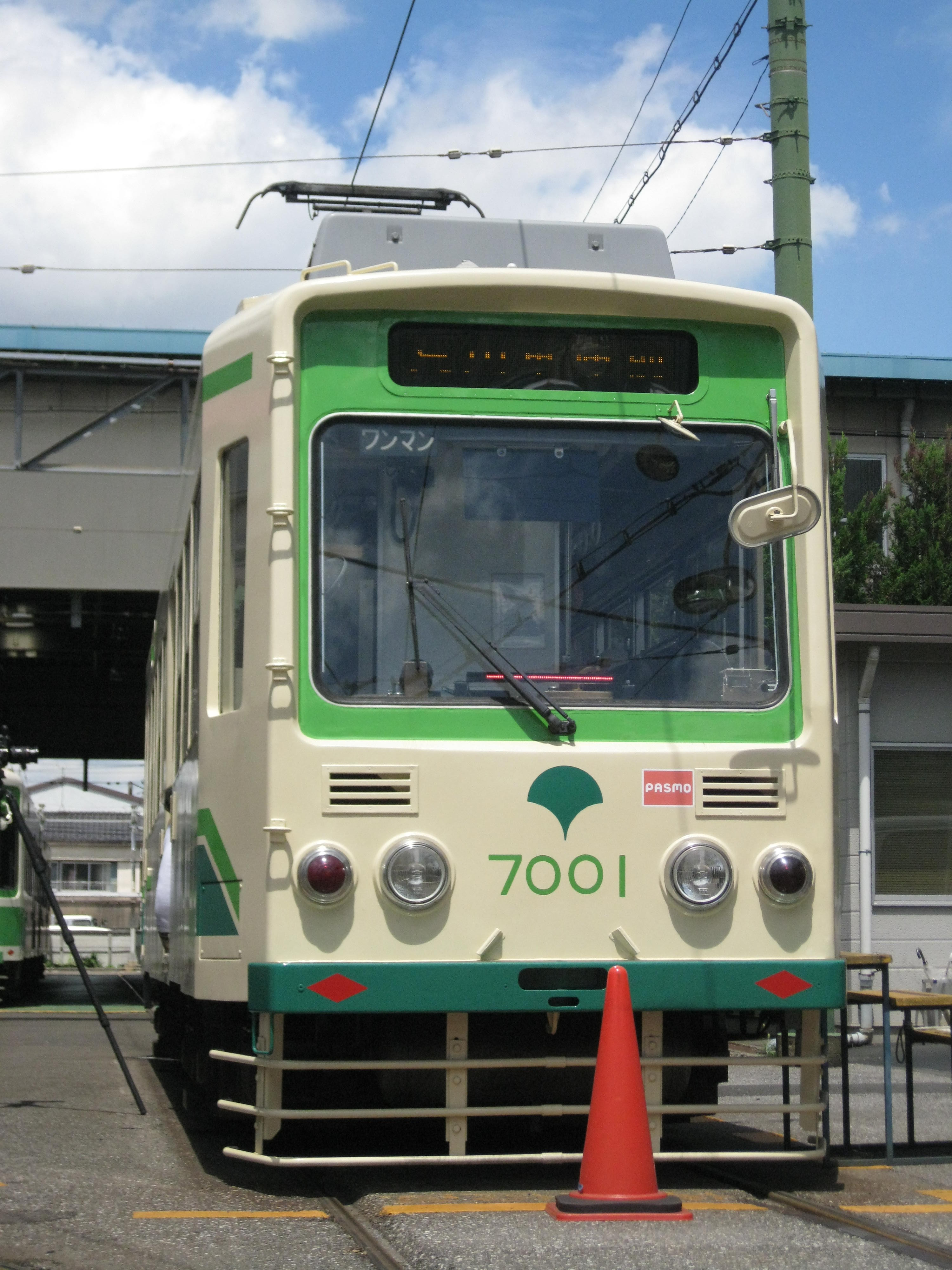 7000形のトップナンバーの7001号車。 元は7055号車